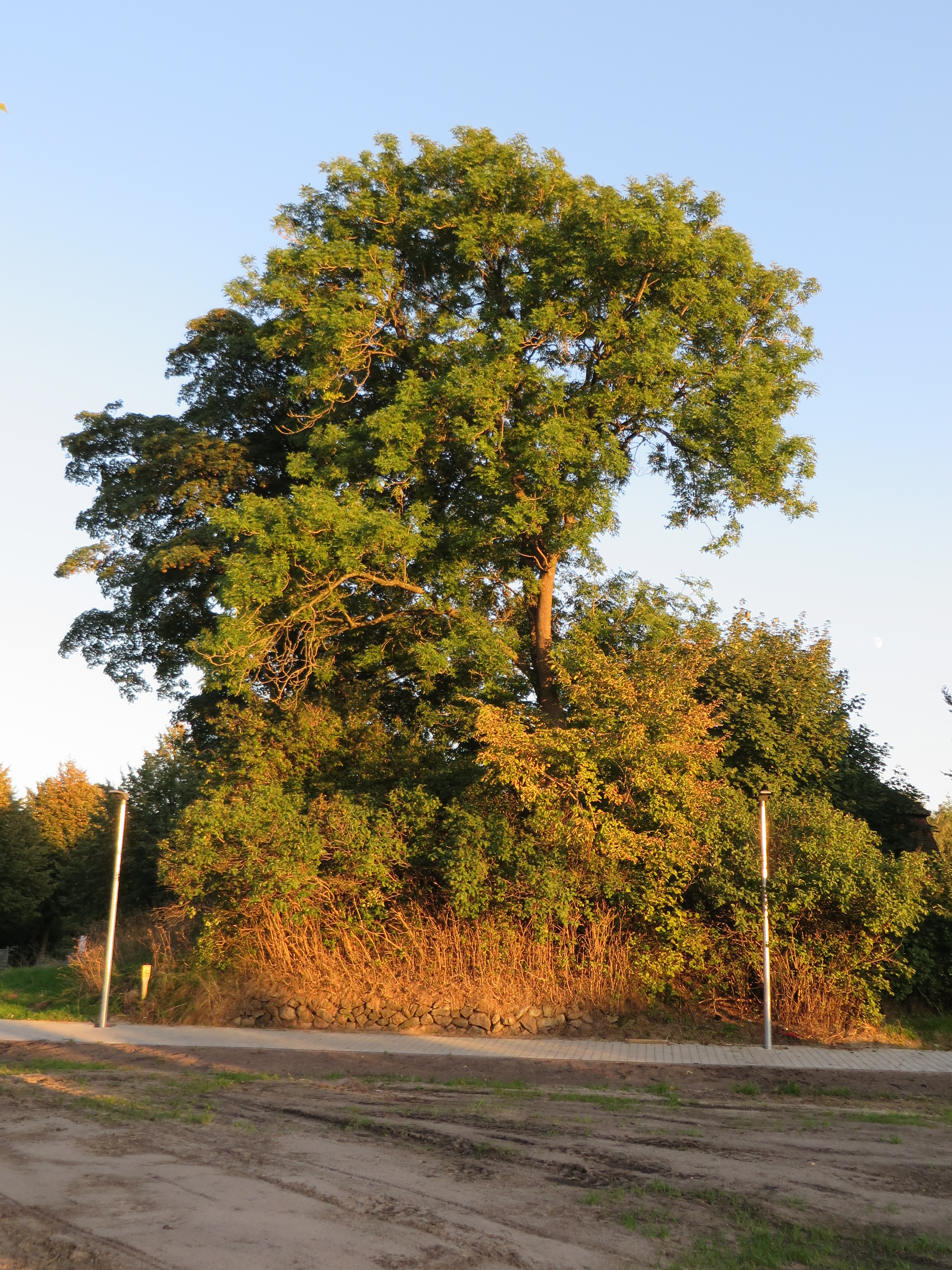 Friedenshügel, Flensburg 4 September 2014, Hochformat, Bild 01